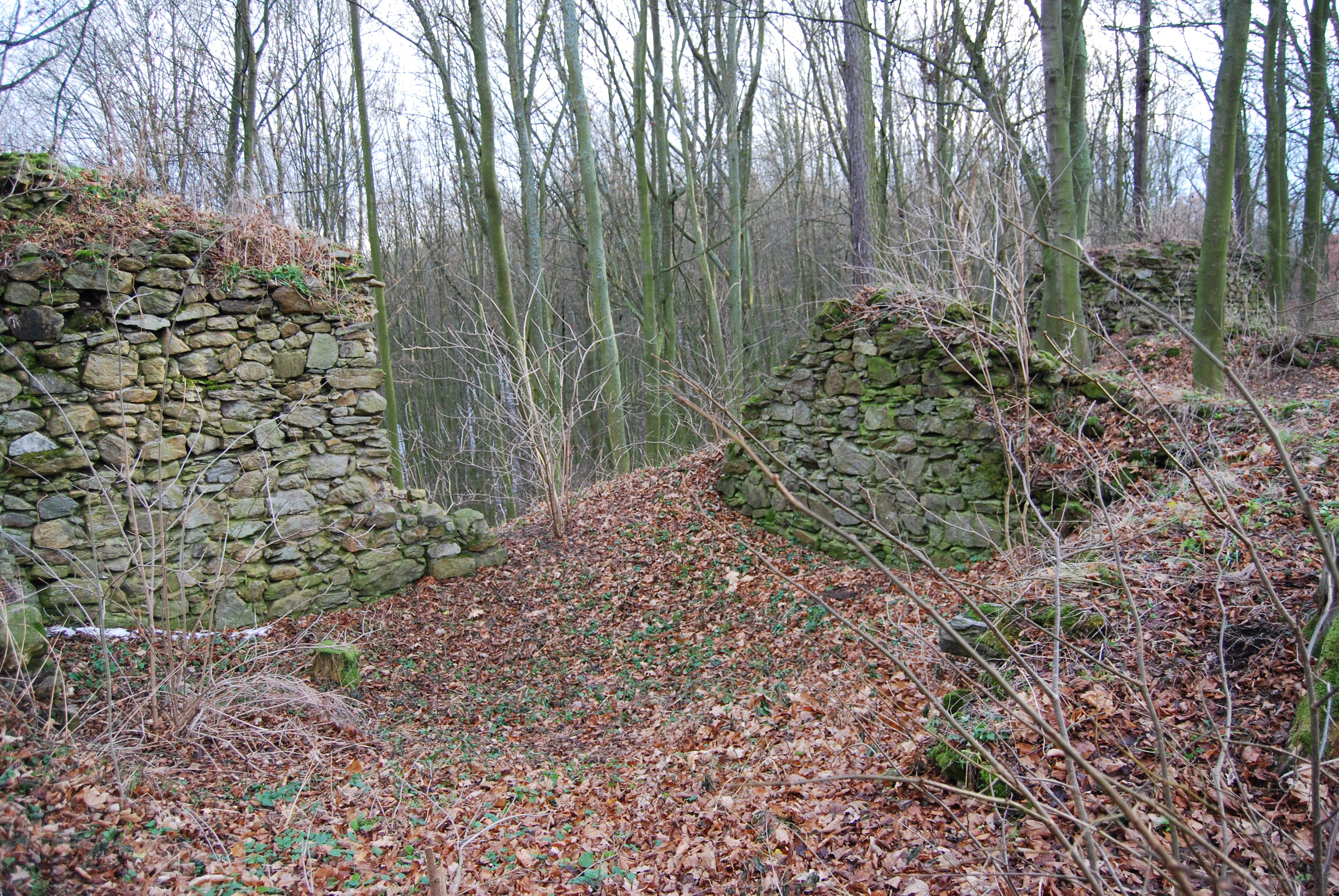 Zbytky místností jižního křídla. Prácheň - zřícenina gotického hradu na skále nad Otavou u Horažďovic. Okres Klatovy. Česká republika.